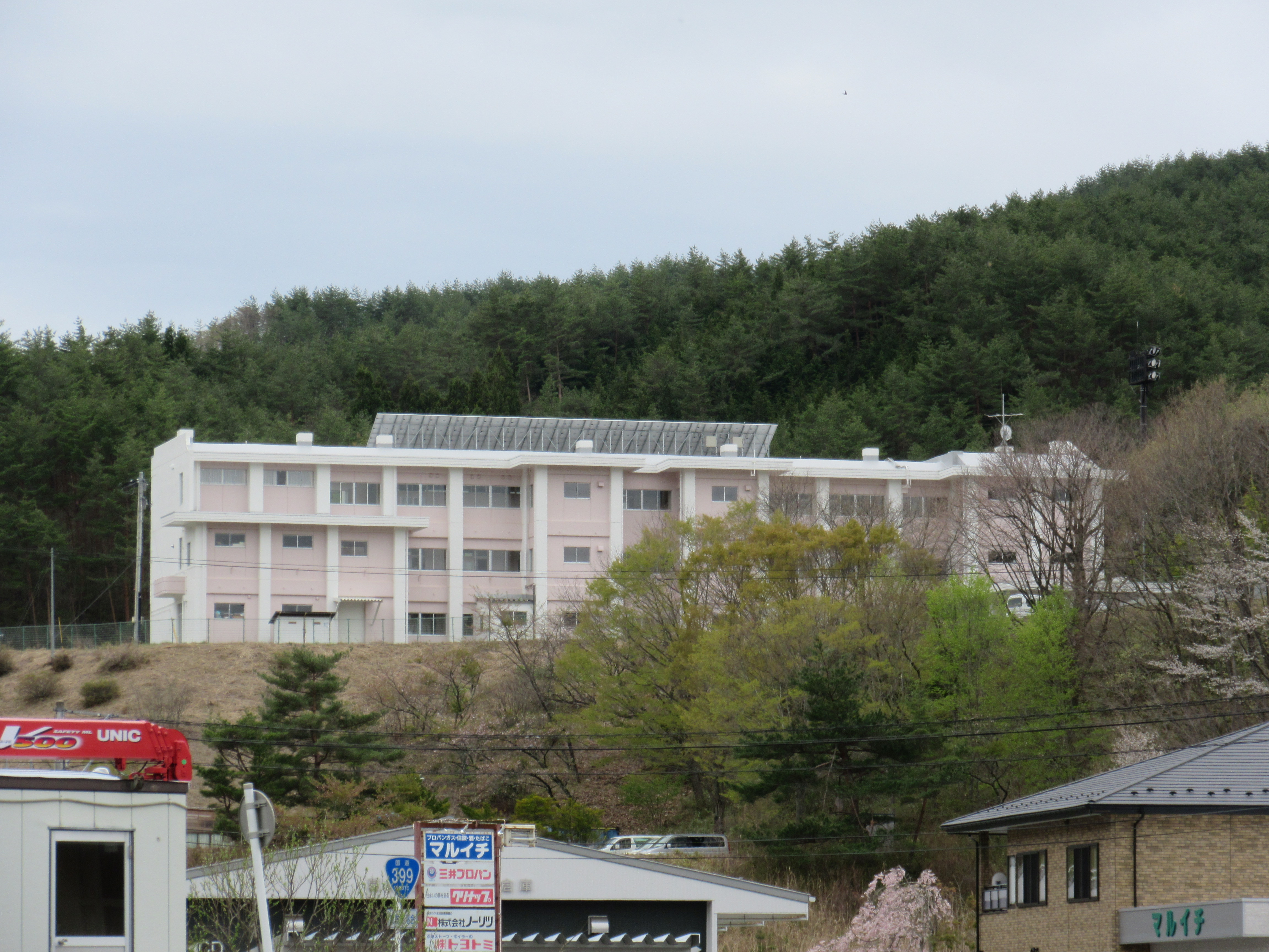 葛尾中学校 Canon PowerShot SX600 HS